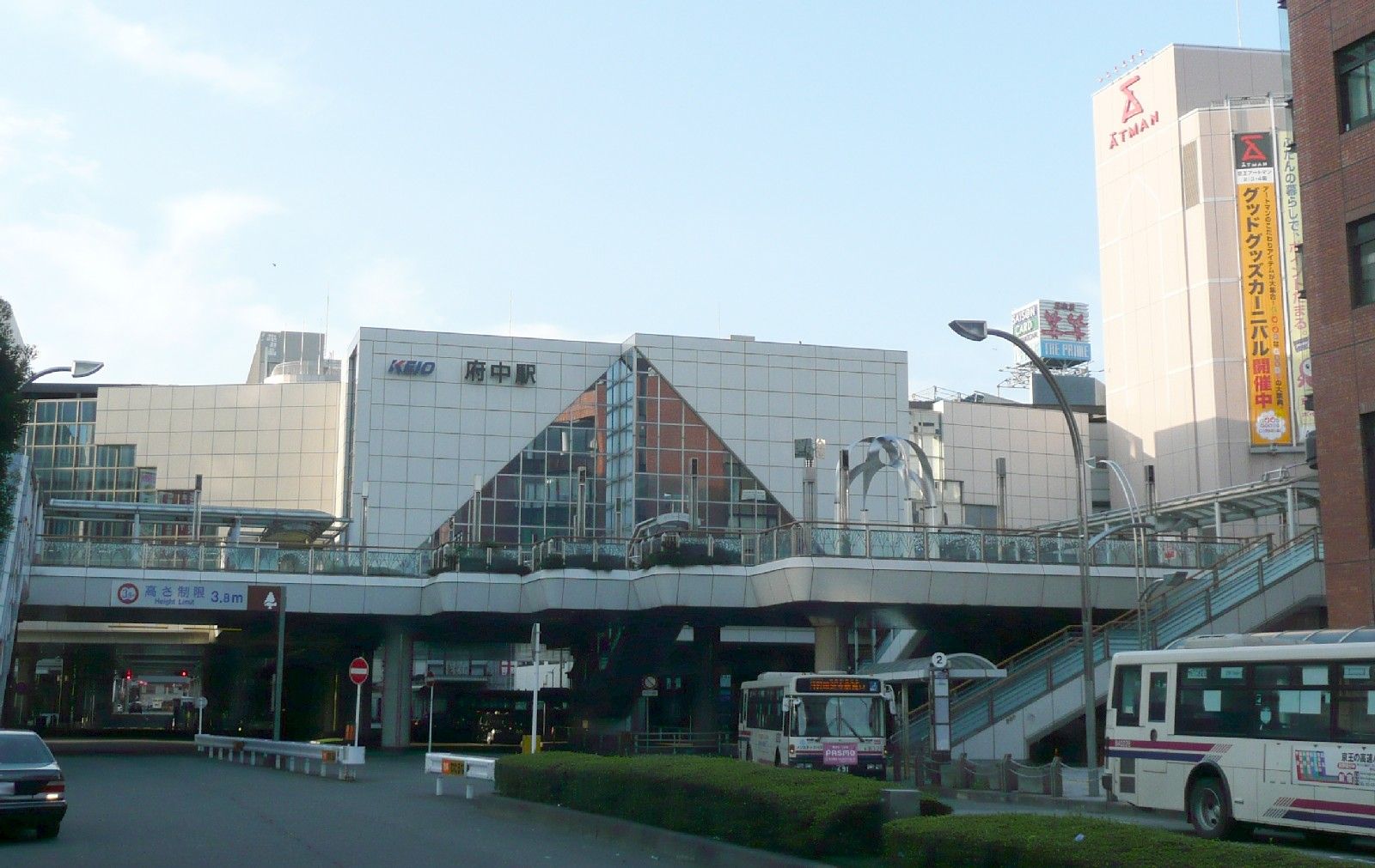 府中駅北口